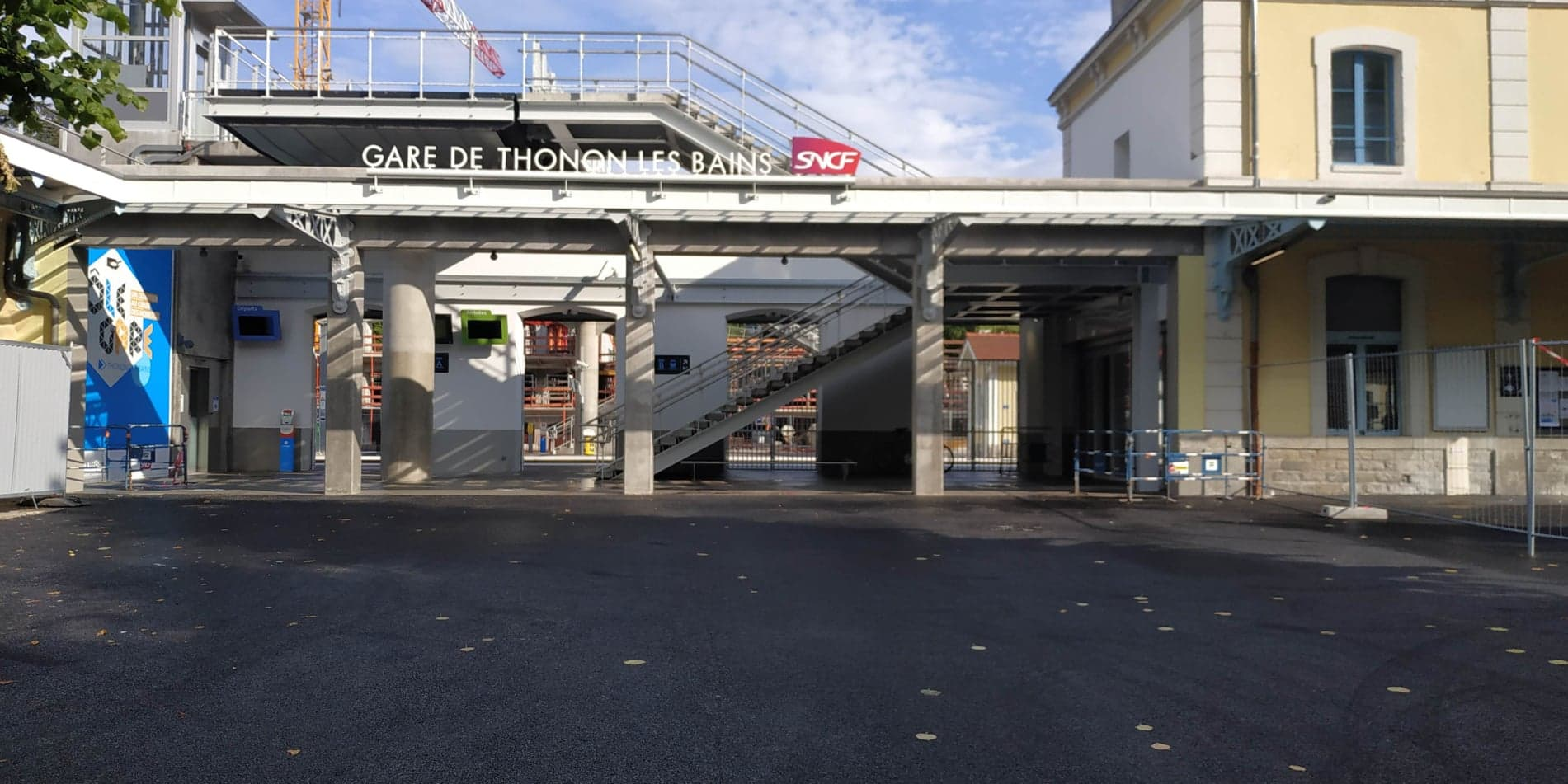 Nouveau bâtiment voyageurs Thonon-les-Bains